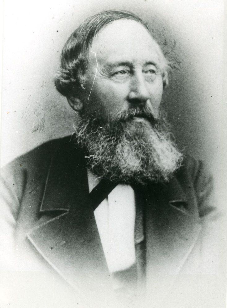 Ernst von Leutsch (1808–1887), German classical scholar